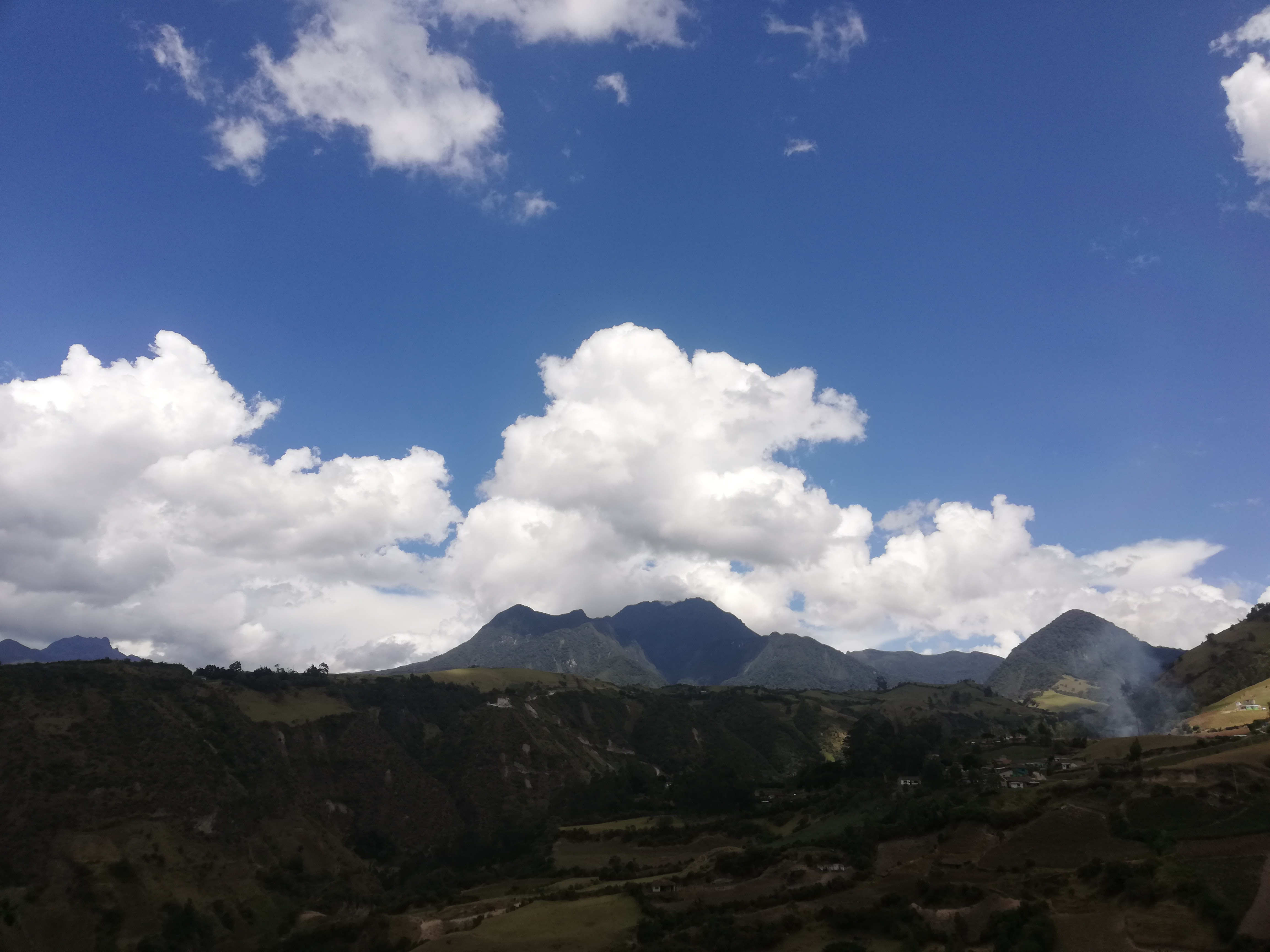 Volcán